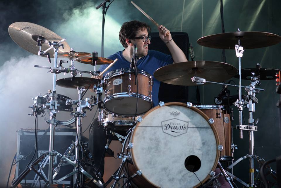 Red Cardell - Festi' Val de l'Oust 2016